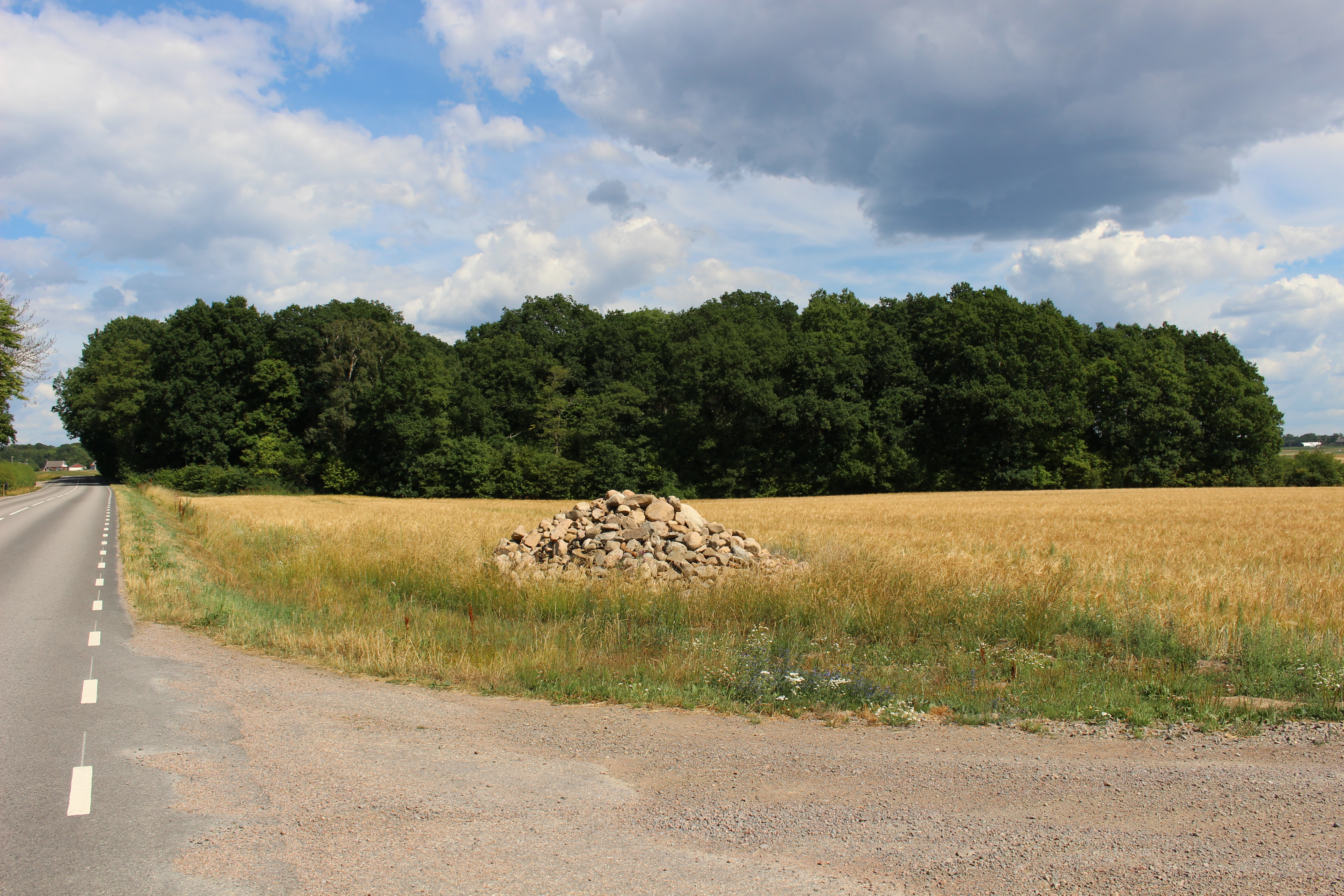 Prästängens naturreservat är en skogsdunge. Vy från väster.